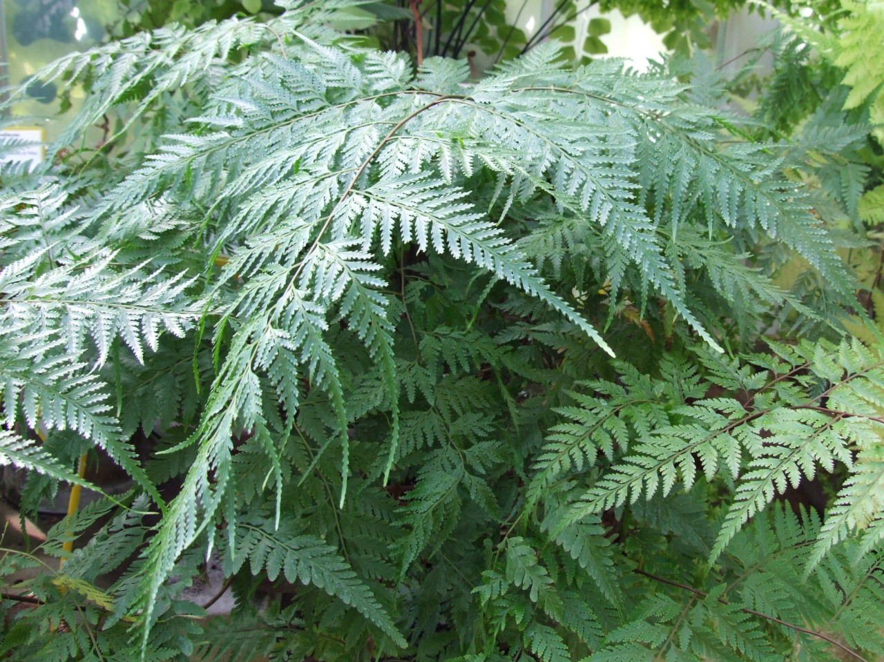 Davalia solida